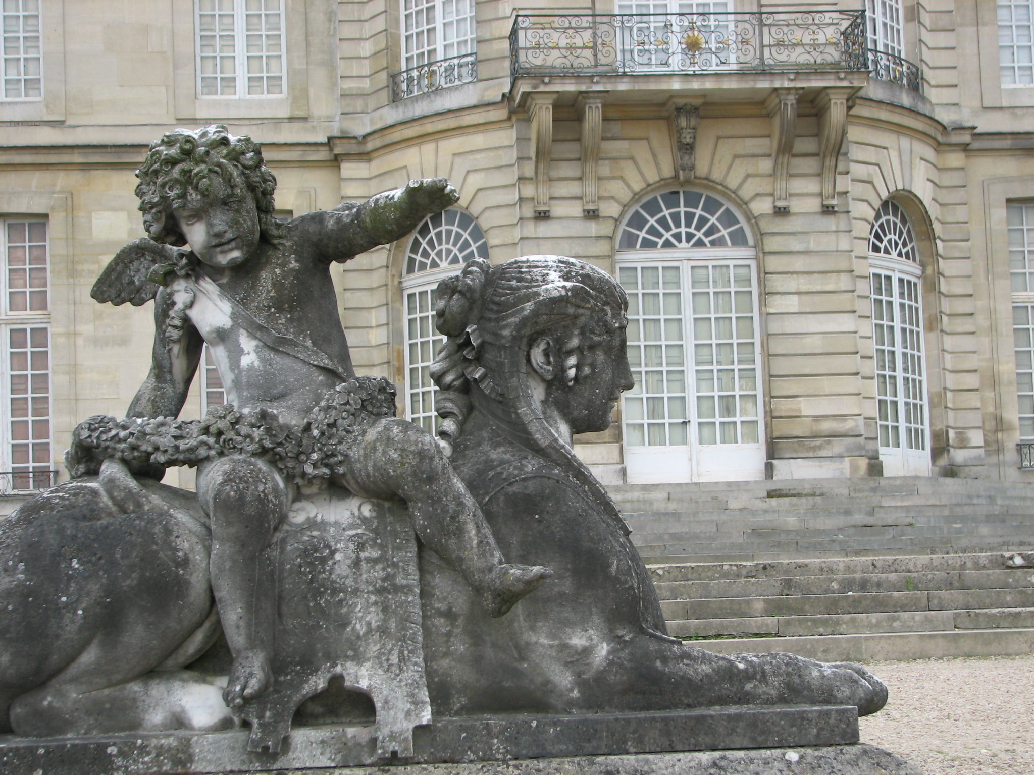 Un sphinx à l'arrière du château de Champs-sur-Marne en Seine-et-Marne en France.